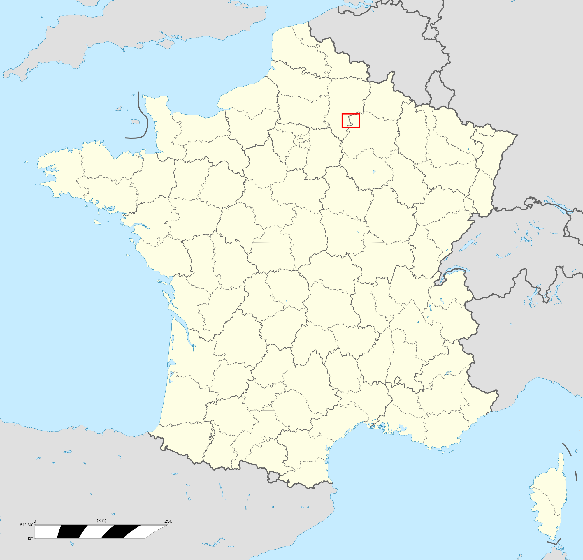 Position du Tardenois sur une carte de France